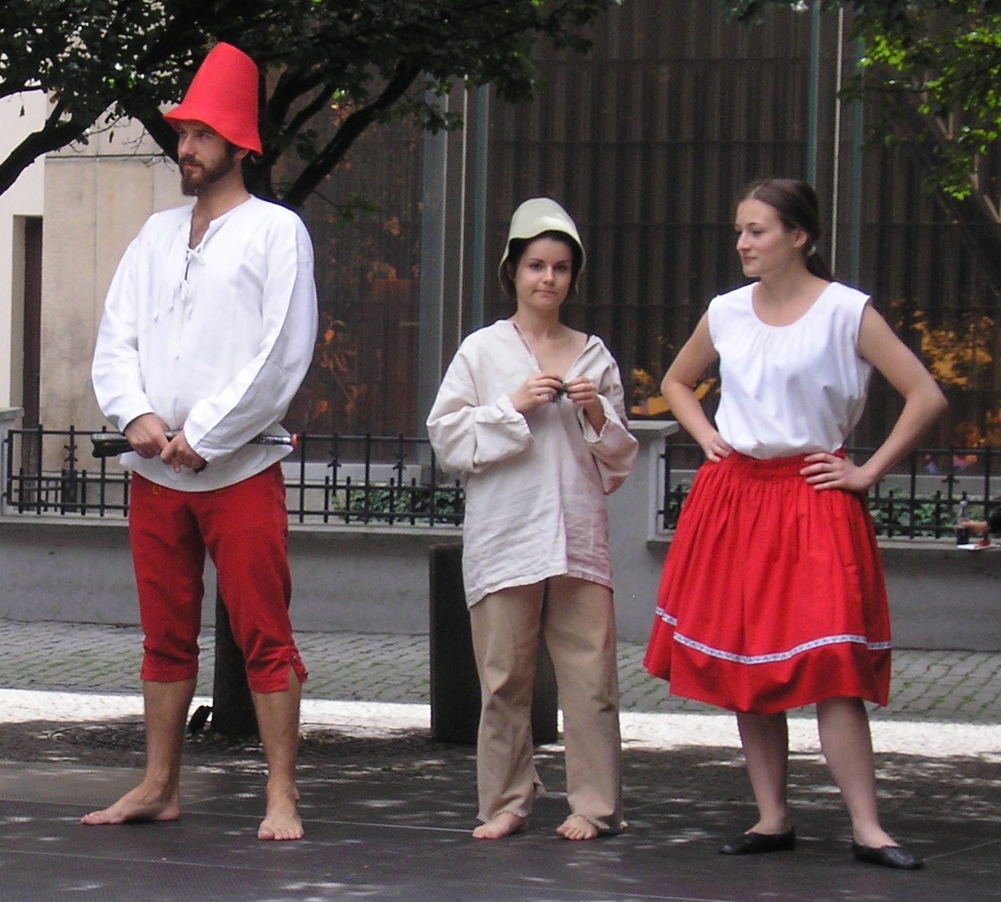 Herci ztvárňující v Praze na Staroměstském náměstí pohádku O loupežníku Rumcajsovi